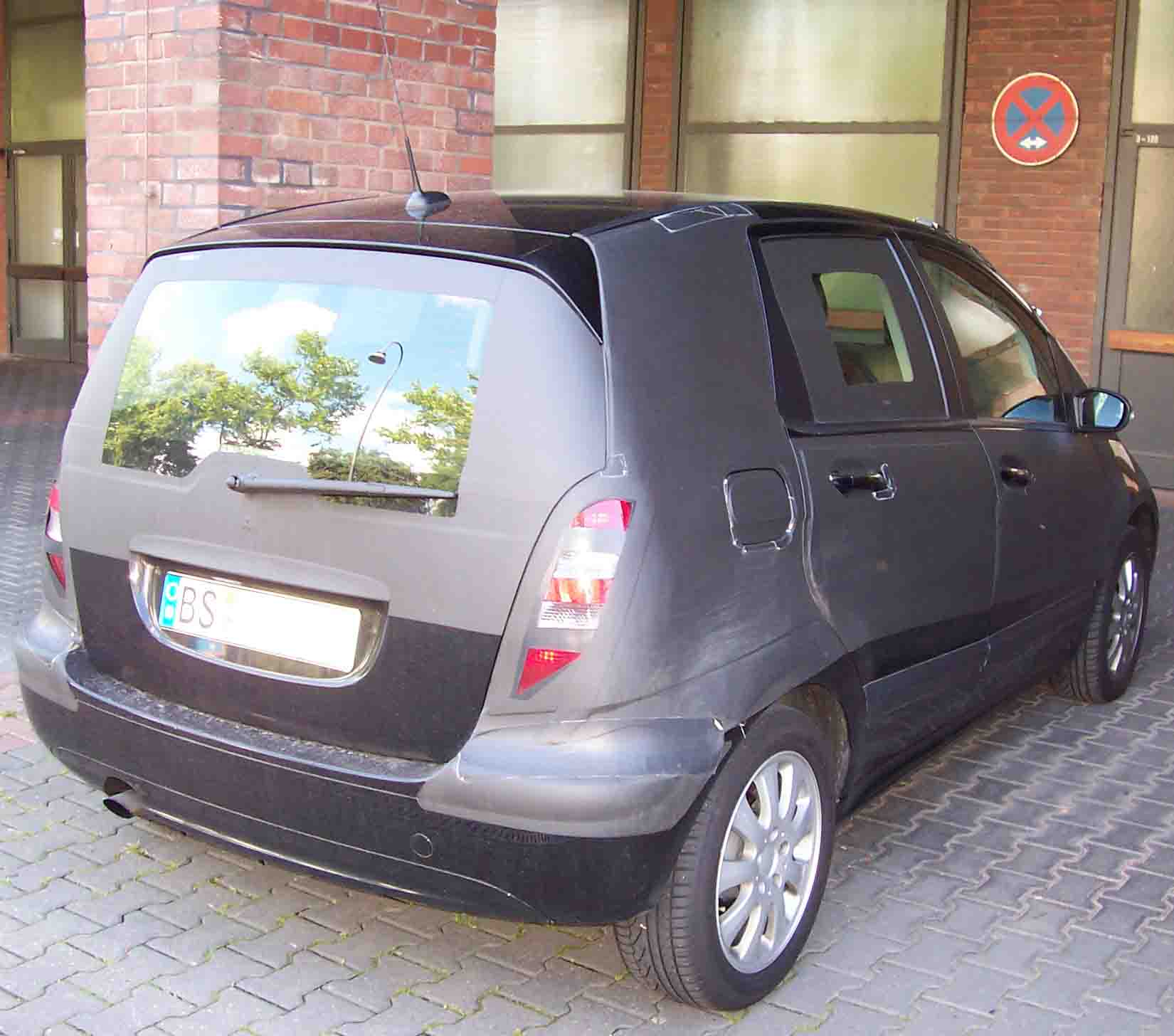 Mercedes-Benz A-Klasse Erlkönig, da vor der Premiere am 11. September 2004 gesehen! aufgenommen: am 19. Juni 2004 in Köln-Deutz, Parkplatz am Messegelände Bild bearbeitet: deutsches Kfz-Kennzeichen teilweise unkenntlich gemacht, nur Herkunftsort BS = Braunschweig stehen gelassen! Fotograf: User:Kandschwar